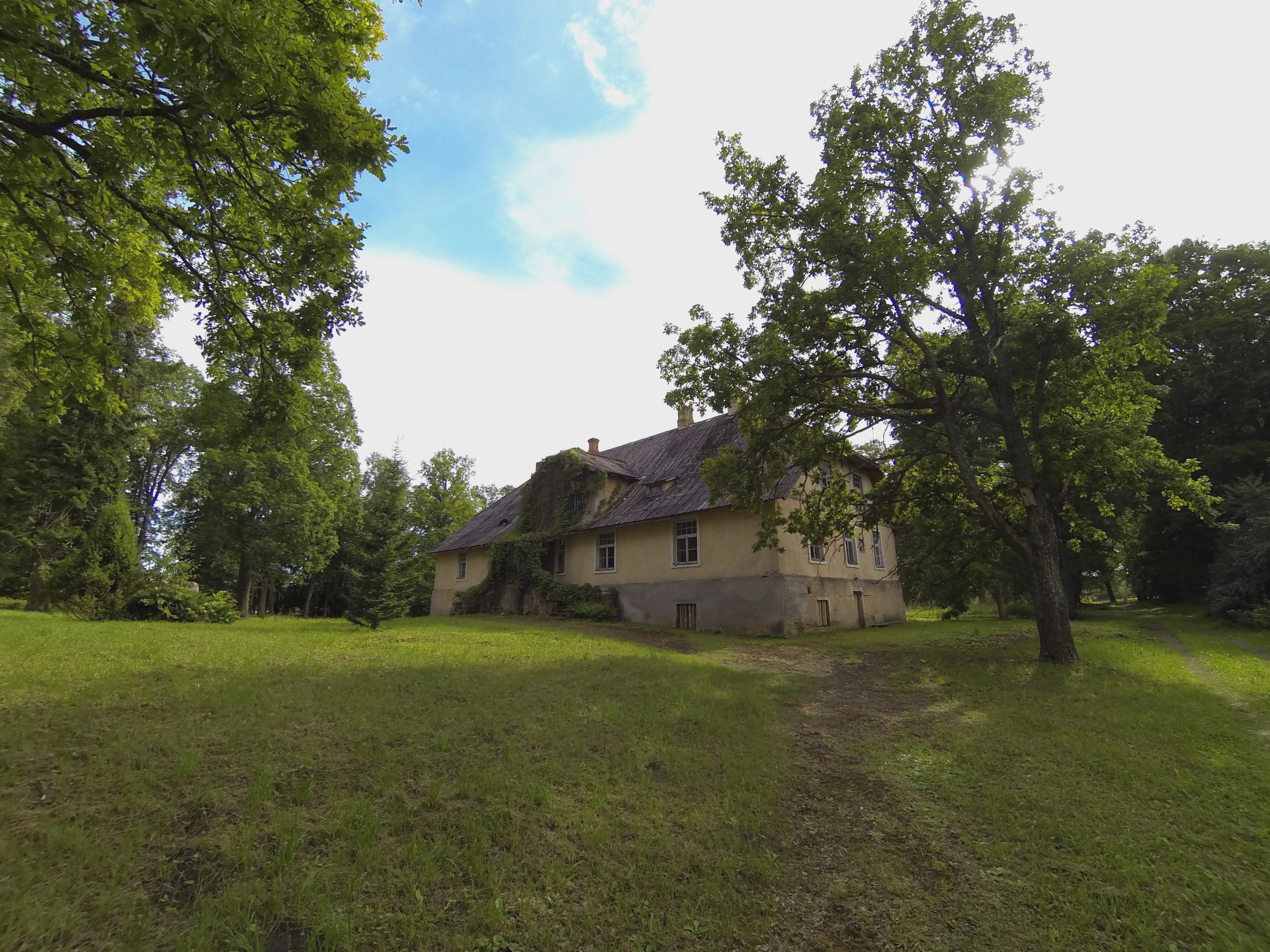 Vecbilska mõisa peahoone 2015. aastal.